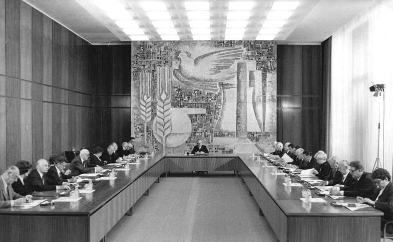 ADN-ZB Mittelstädt-25.6.81- Berlin-Erste Sitzung des Staatsrates. Der von der Volkskammer der DDR neugewälte Staatsrat trat zu seiner ersten Sitzung zusammen.